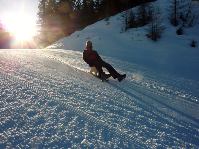 Böckl